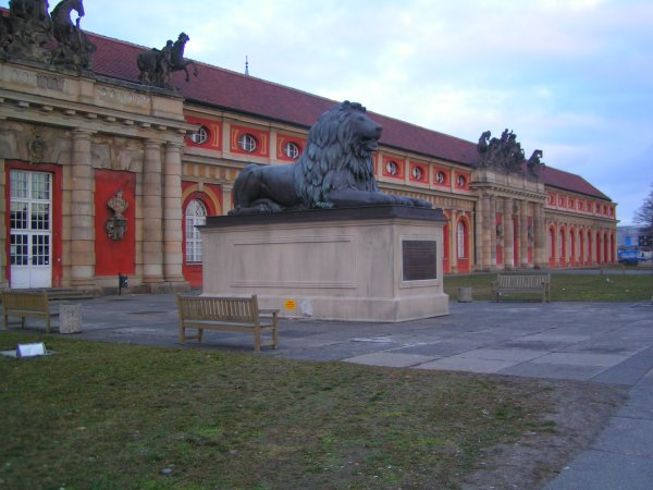 Filmmuseum Potsdam mit dem Löwen vor der Bank von England (Requisite aus dem Film “Around the World in 80 Days” (2004), seit 2008 Filmpark Babelsberg)